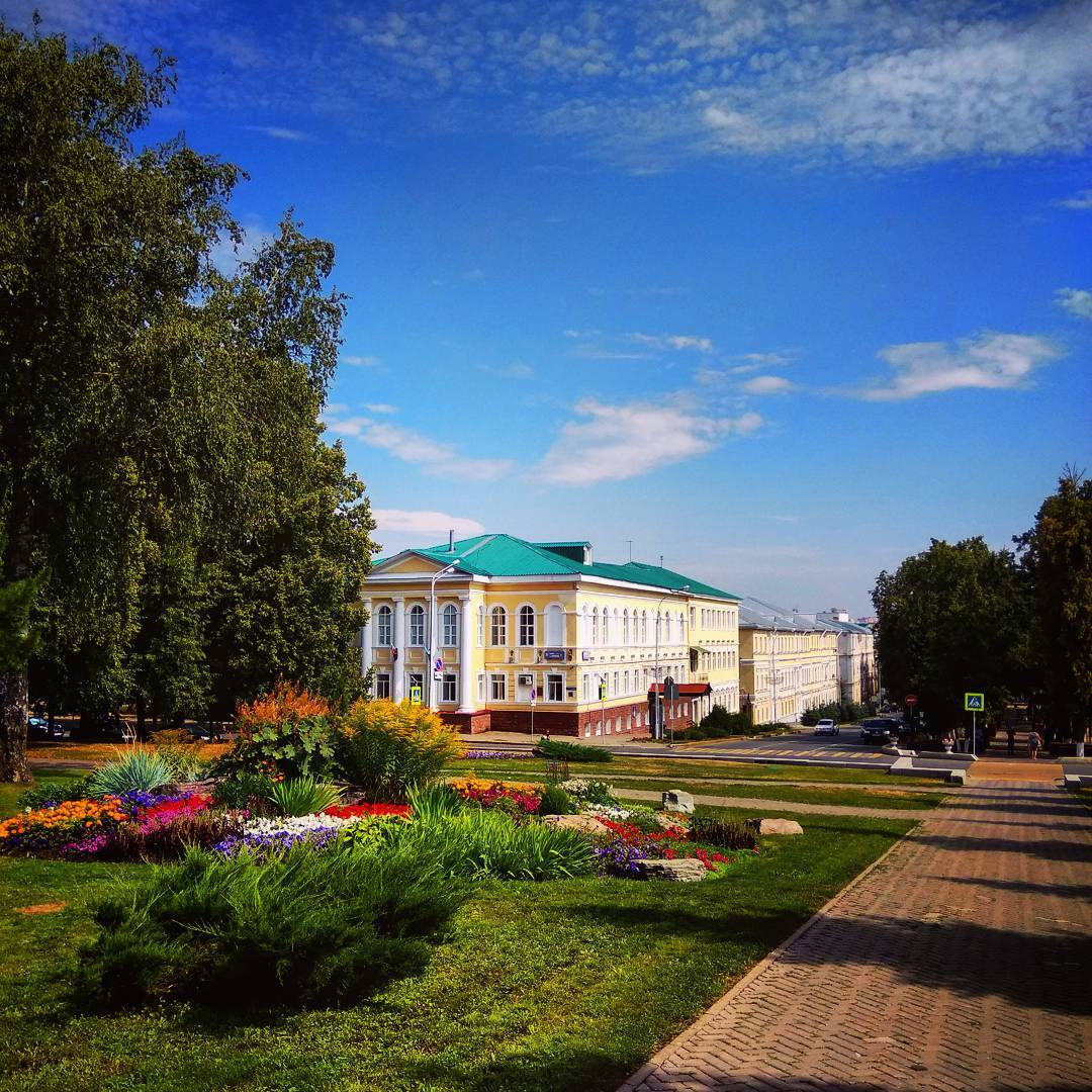 Дом губернатора, построенный в середине 19 века в стиле классицизм